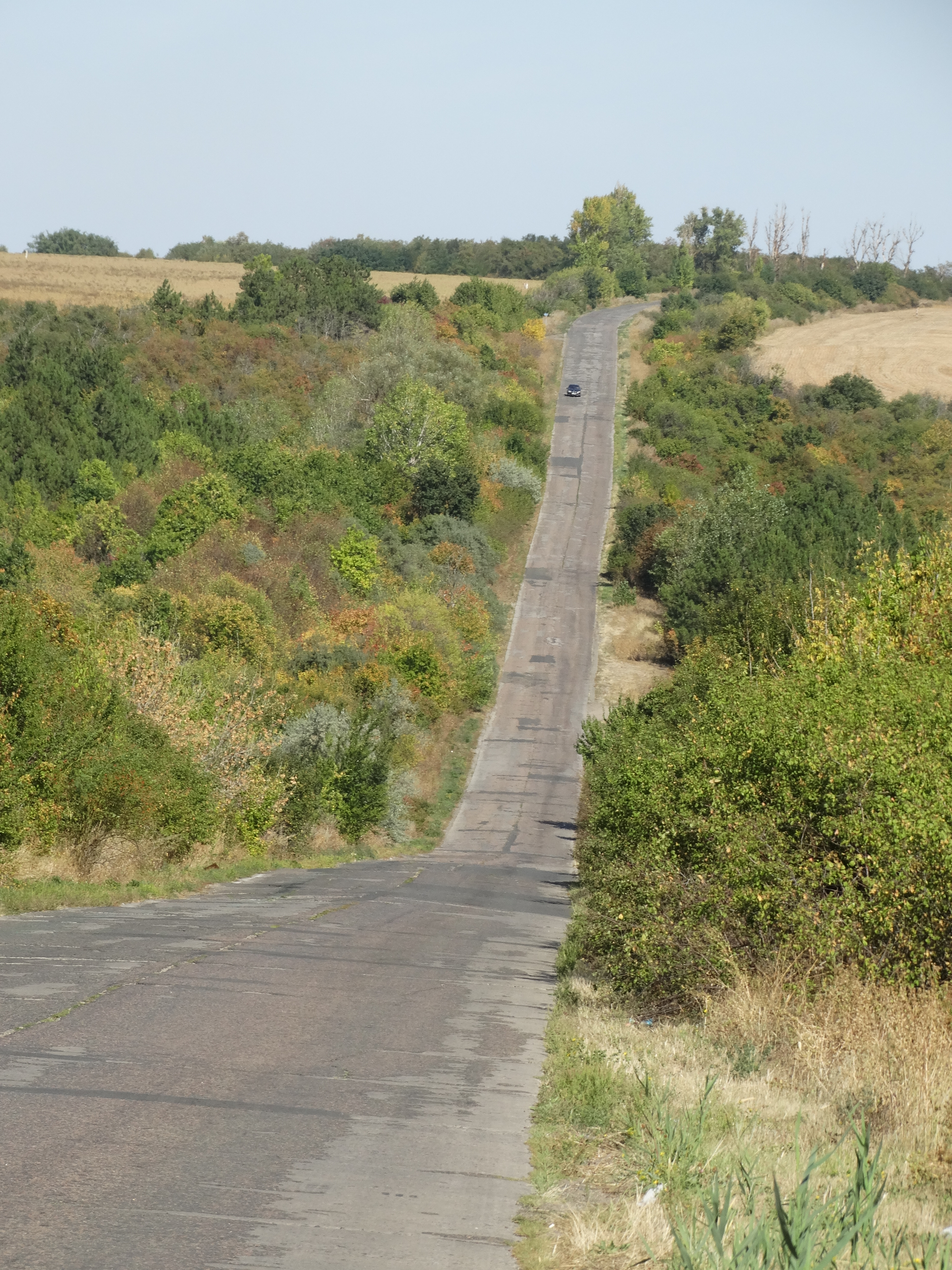 Вікіекспедиція на північ Одещини